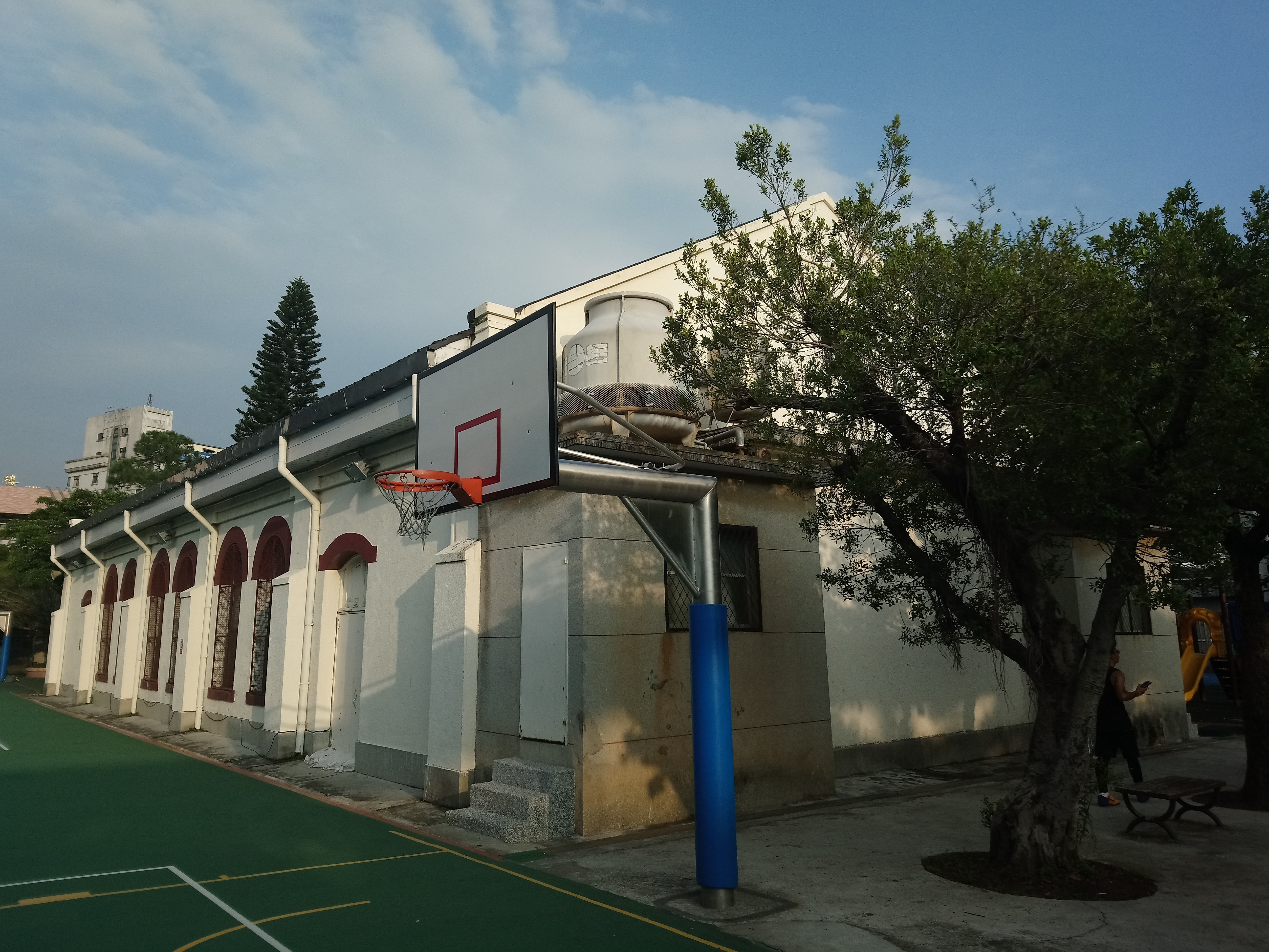 原八芝蘭公學校講堂,台北市士林區街上次分區福德里